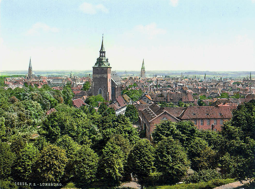 Lüneburg, ca. 1890-1900 / Blick vom Kalkberg. Kirchtürme, von links nach rechts: Nikolaikirche, St. Michaelis (wo Johann Sebastian Bach von 1700 bis 1702 Chorknabe war), St. Johannis (an der Frontseite von Am Sande). Das große Gebäude rechts im Vordergrund ist das damalige Zuchthaus; heute wird es als Herberge "Zur Heimat" genutzt. Detroit, Mich. : Detroit Photographic Company, 1905. Print no. "16828".